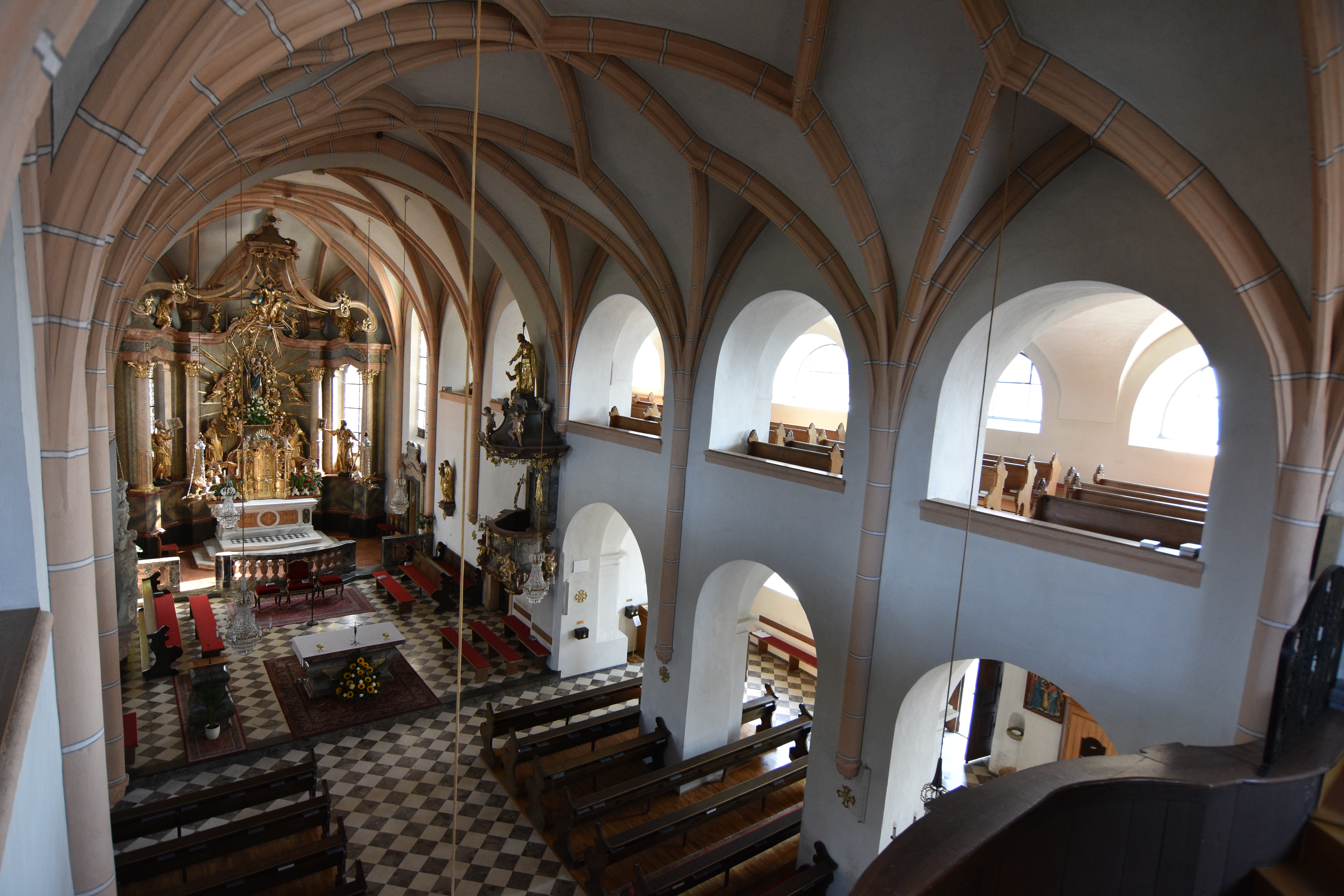 Pfarrkirche Straden - Interior